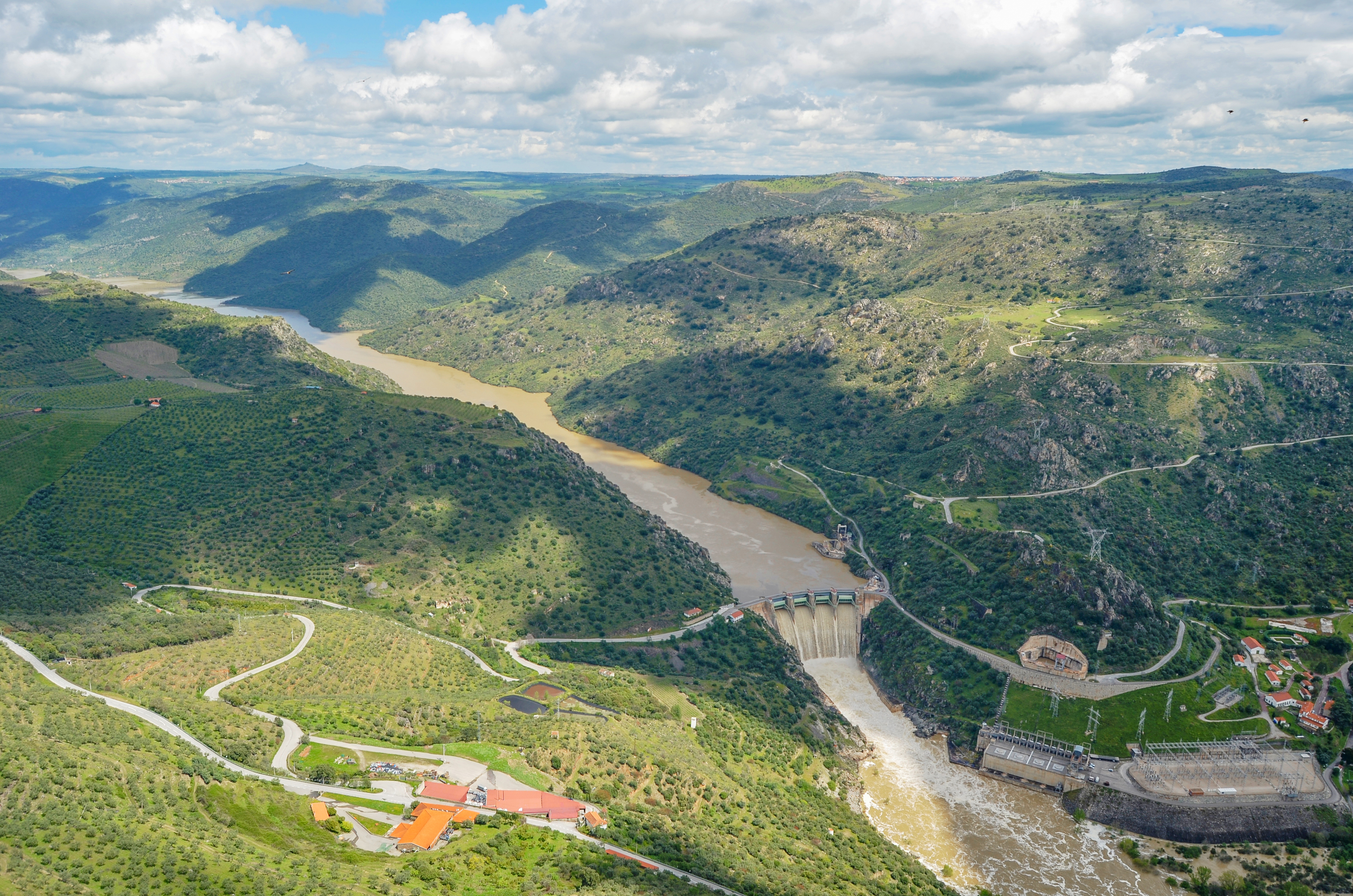 A direita o Parque Natural de Arribas do Douro, a esquerda o Parque Natural do Douro Internacional